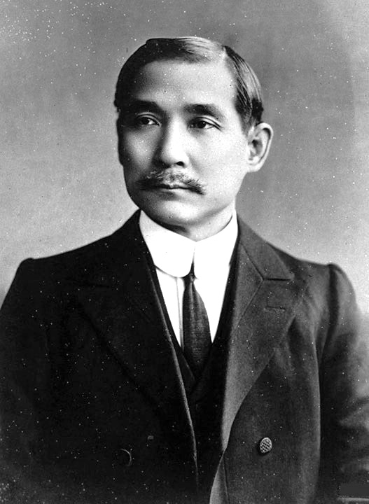 1912年9月11日，孙中山拜访逊清摄政王载沣，对其在辛亥革命期间，能代表清政府逊位并和平交出政权加以慰勉。此次拜访，孙中山还将其亲笔签名盖章的一张照片赠送给载沣。该照片是1911年12月25日，孙中山从海外归国后，由上海同生照相馆所拍摄的。这张孙中山亲笔签名照片，一直保存在载沣家中，直到1952年由载沣之子溥任（又名金友之）捐赠给中国国家博物馆。